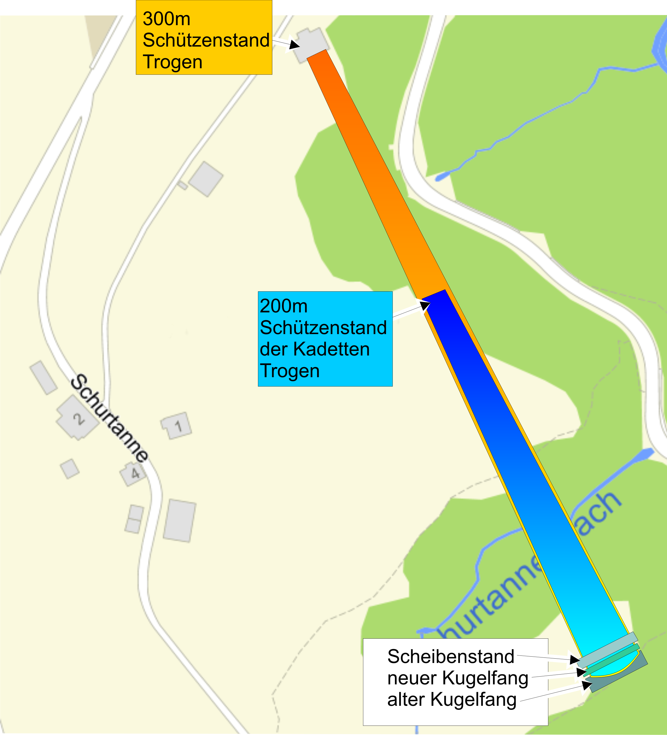 Karte zur Schiessanlage Trogen